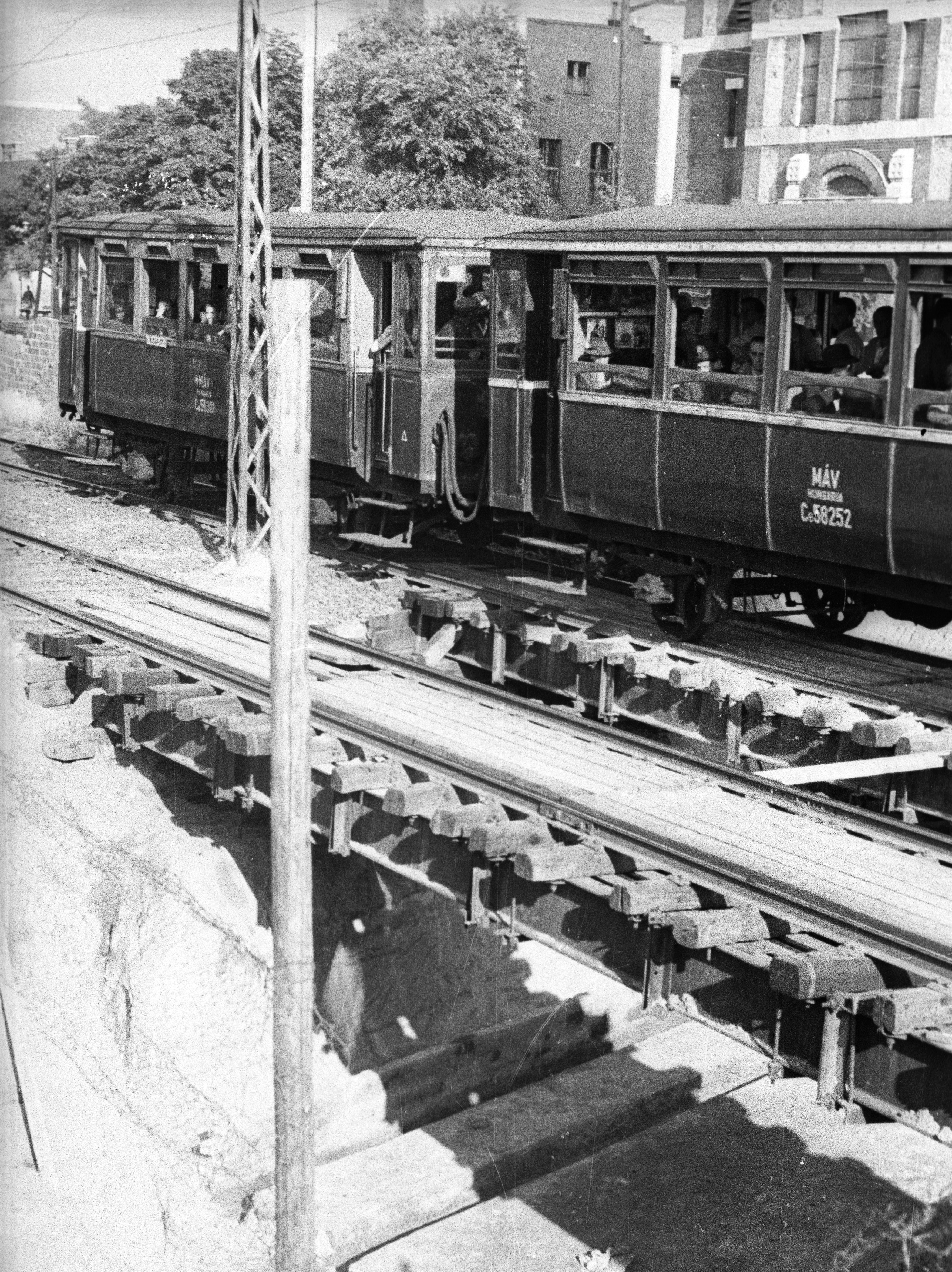 a HÉV vonal a metróépítés idején, háttérben a Lisieux-i Szent Teréz templom (Törökőri plébániatemplom). Location: Hungary, Budapest VIII. Tags: Budapest Title: a HÉV vonal a metróépítés idején, háttérben a Lisieux-i Szent Teréz templom (Törökőri plébániatemplom).